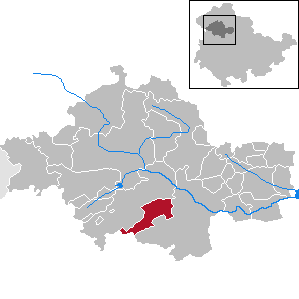 Schönstedt in Thuringia - Unstrut-Hainich-Kreis